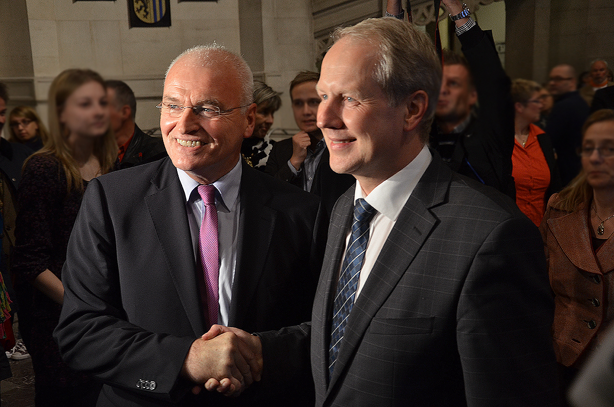 Im Neuen Rathaus gratuliert Matthias Waldraff (CDU) noch vor dem amtlichen Endergebnis dem Wahlsieger Stefan Schostok (SPD), dem zukünftigen Oberbürgermeister von Hannover ...